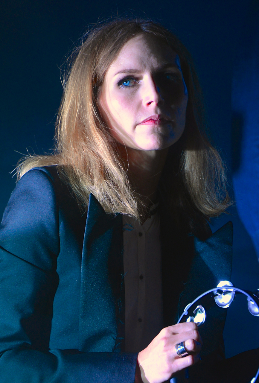 Nina Persson under Stockholms Kulturfestival 2013.